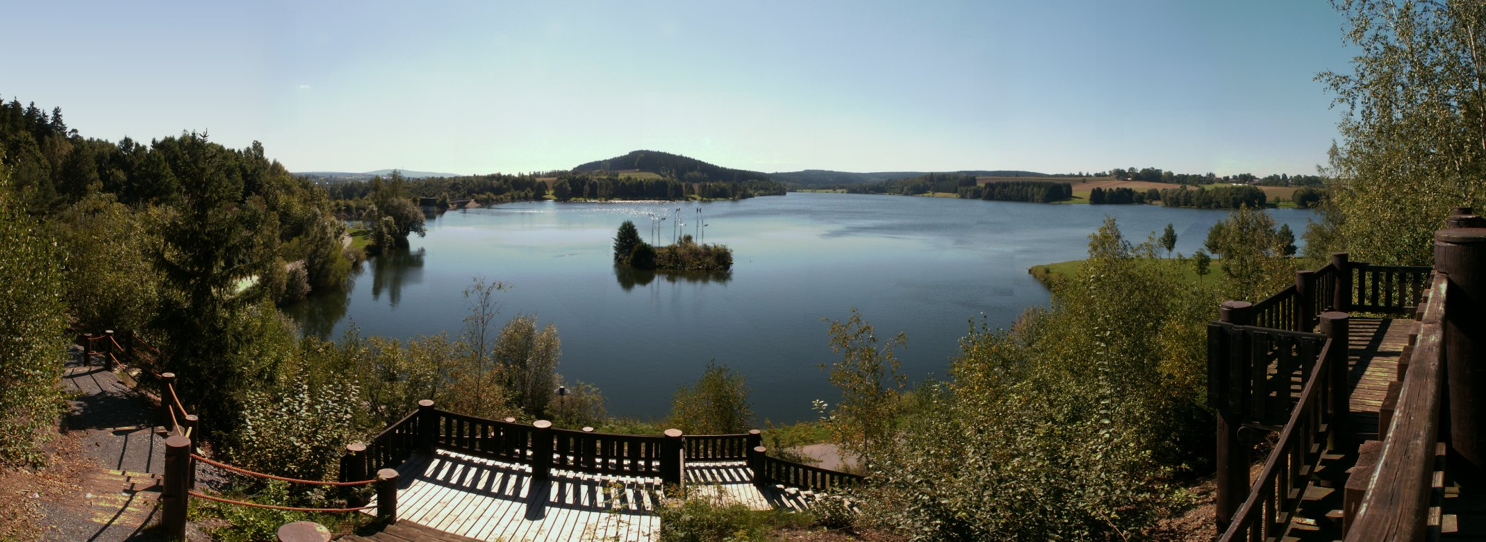 Untreusee in Hof (Bayern)